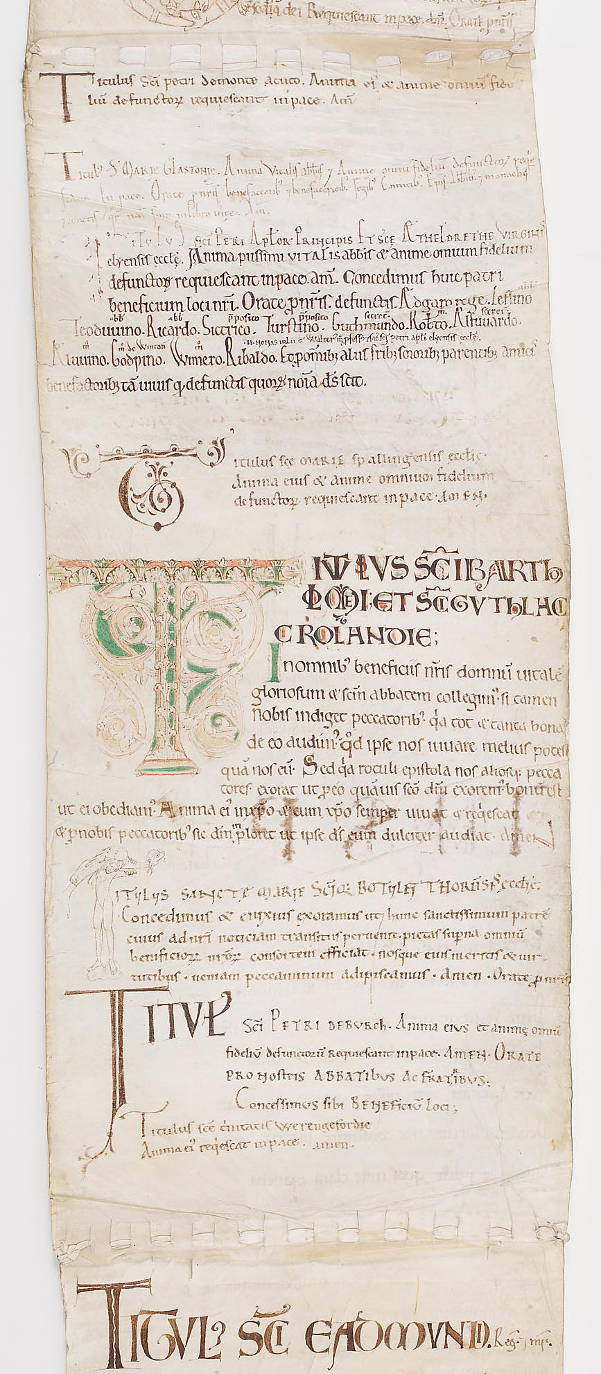 Rouleau funéraire de Vital, abbé de Savigny. [1122-1123].